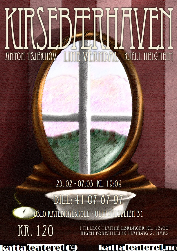 Plakaten til Kattateateret 09. Konsept og tekstdesign av Johannes Sunde. Grafikk av Susanne Bergø.